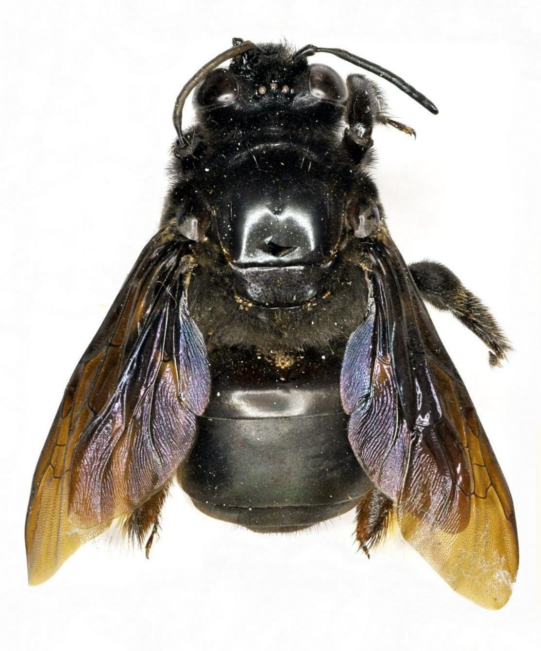 Epicharis rustica - Vista cenital.